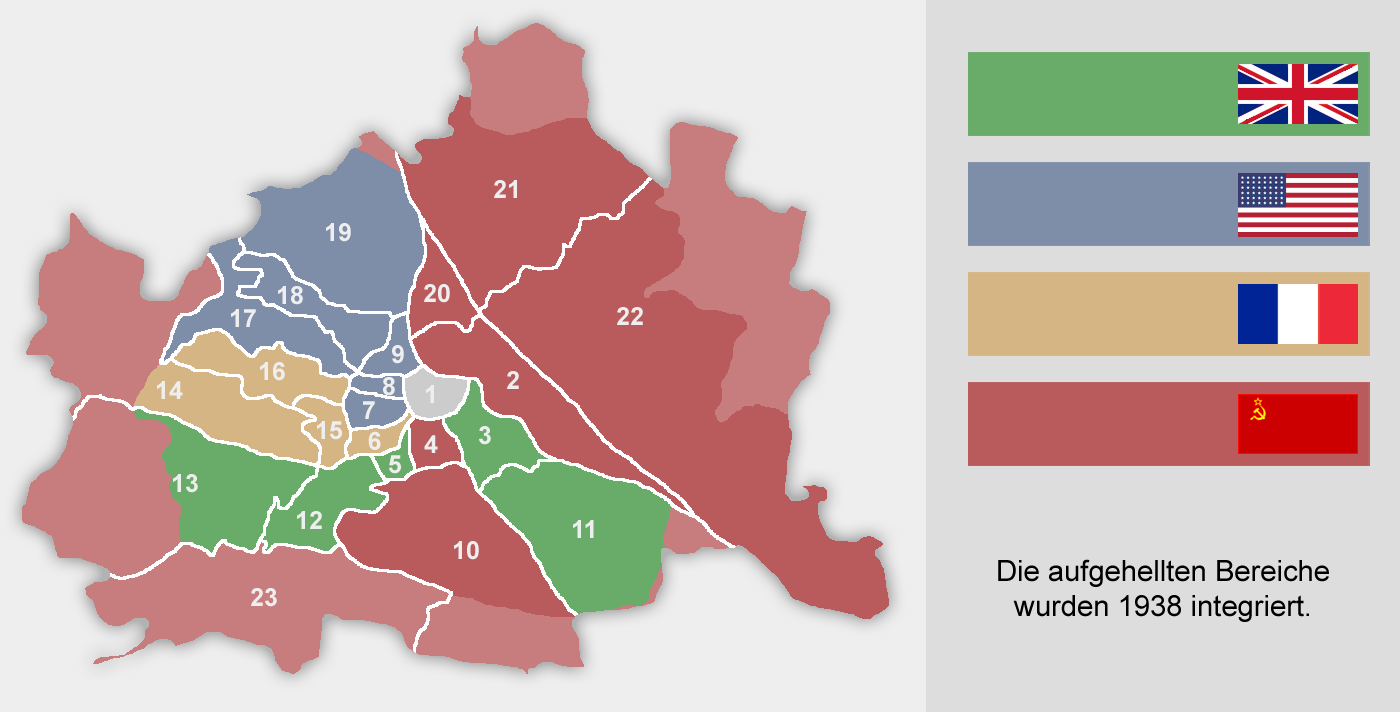 Darstellung der Besatzungszonen Wiens